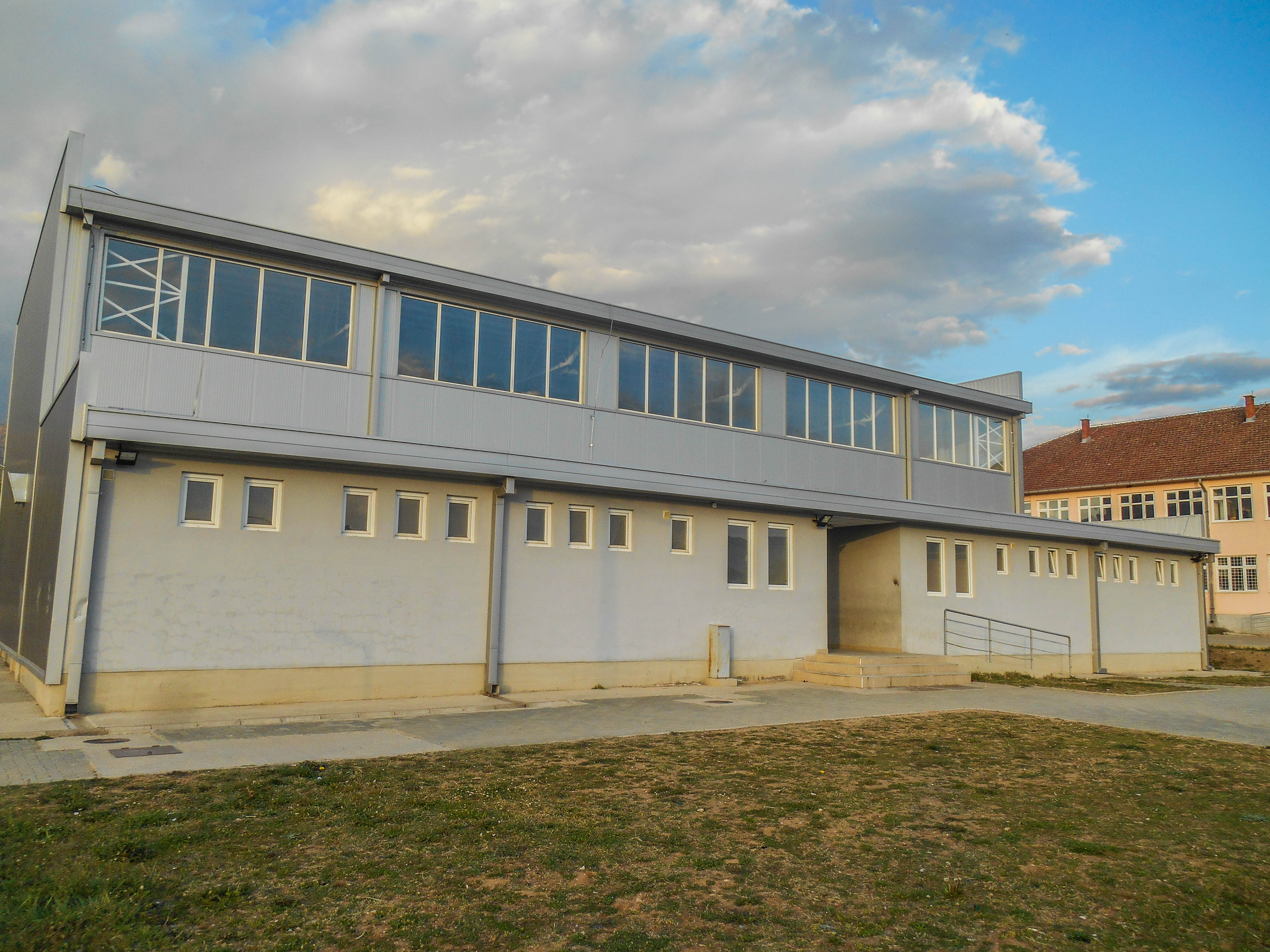 Основно училиште „Св. Кирил и Методиј“ - Иловица